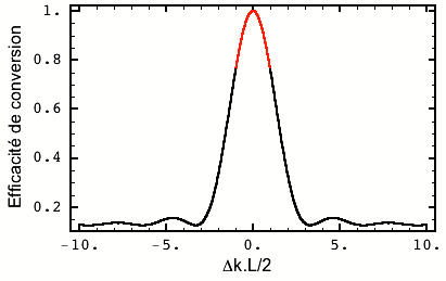 Efficacité de la génération paramétrique en fonction du désaccord de phase pour un cristal de longueur L. La partie en rouge correspond à la zone pour laquelle le gain est plus important que le désaccord de phase. Source : personnelle. Licensing Catégorie:Schéma de physique